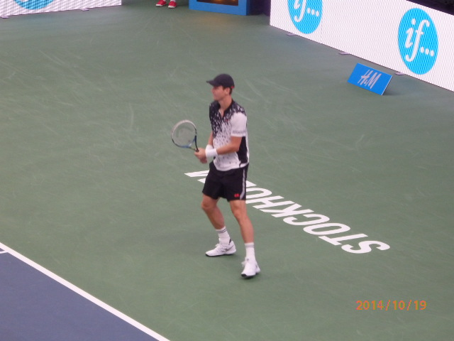 Berdych i Stockholm Open